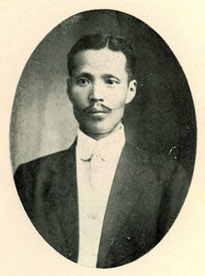 Bân-lâm-gú: Chu Lē 朱麗